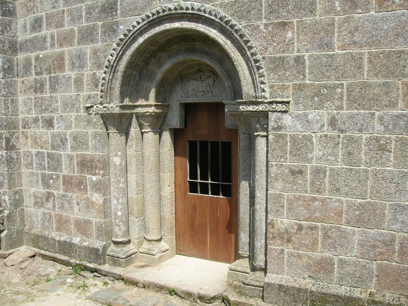 Mosteiro de San Xoán de Caaveiro (Parroquia:Capela (Santiago), concello da Capela, Comarca do Eume, Ferrolterra, Galicia - Spain'Monasterio de San Xoán de Caaveiro'